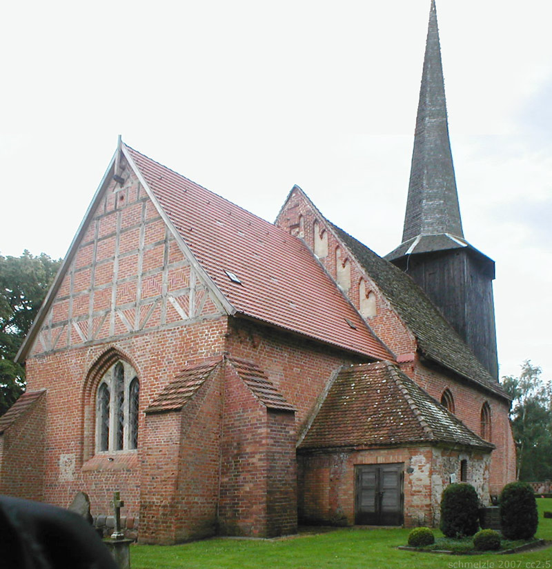 Kirche in Varchentin, Landkreis Mecklenburgische Seenplatte, Mecklenburg-Vorpommern, Deutschland